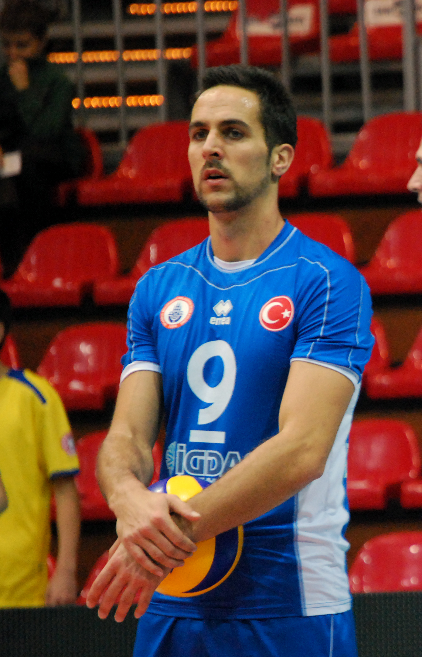 Jeroen Trommel